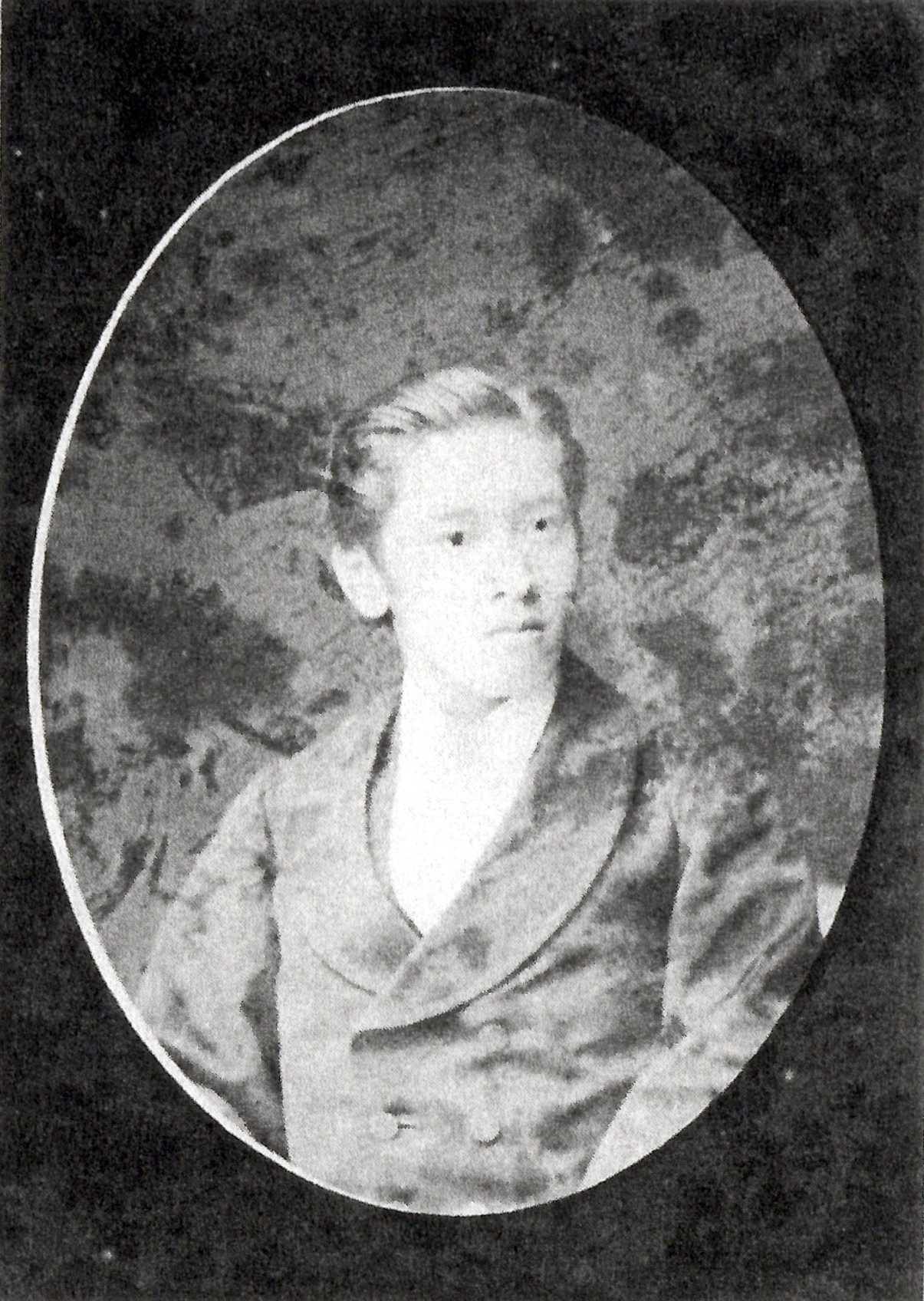 松平義生の肖像写真。